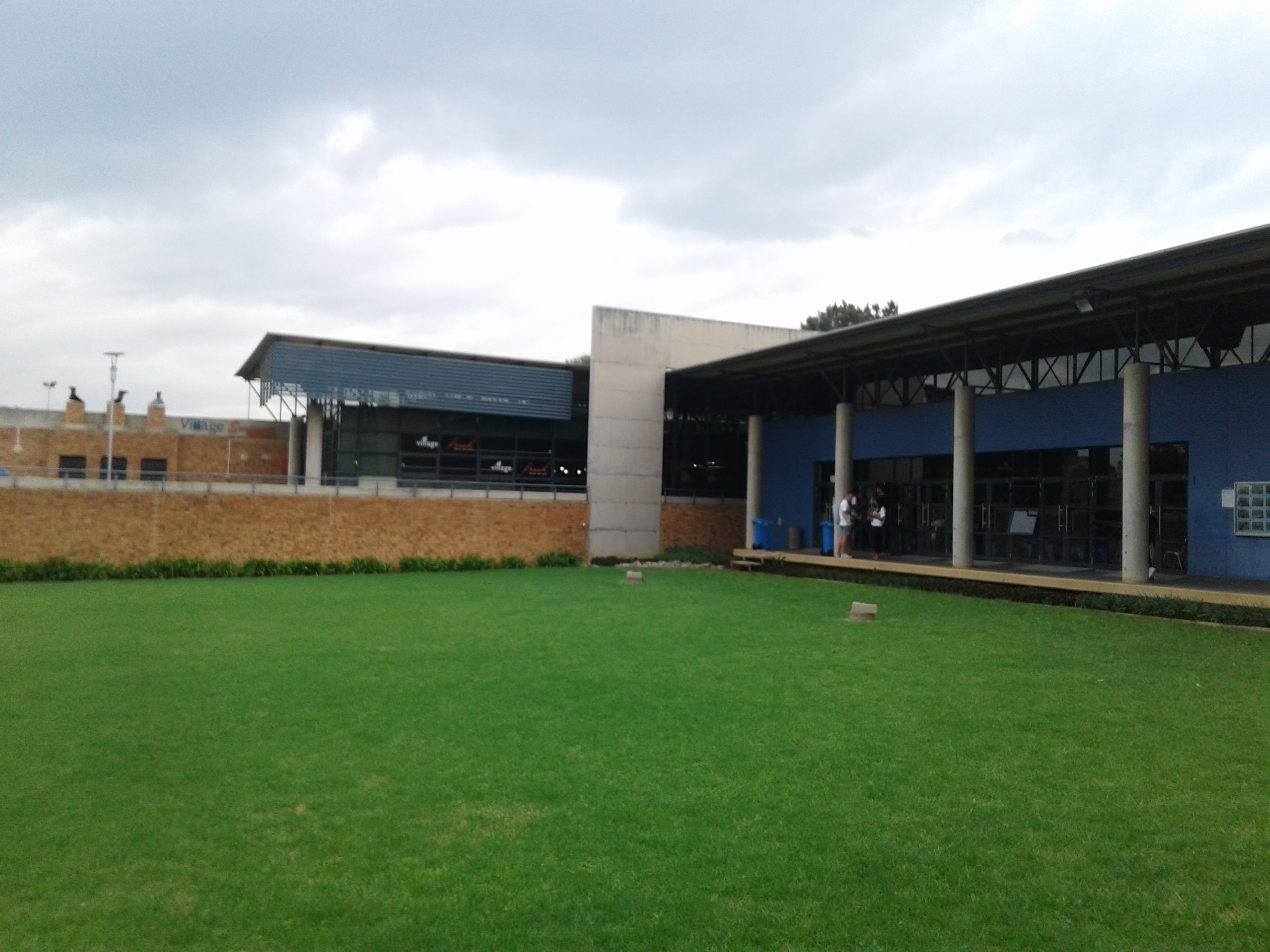 Die hoofgebou van TuksVillage wat die buitekant van die winkel en die saal wys